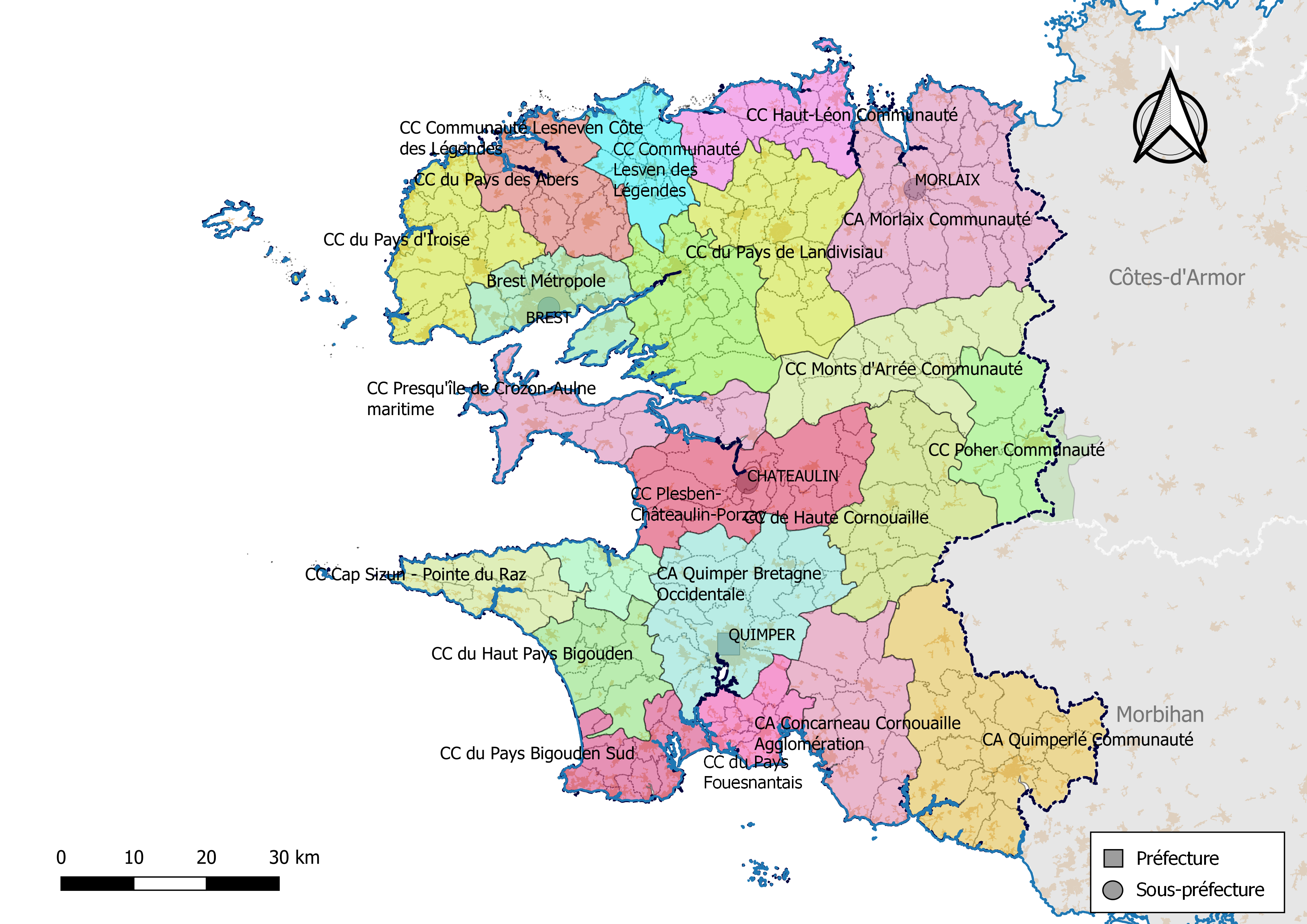 Carte des intercommunalités du département du Finistère, France. Composition au 1er janvier 2019.